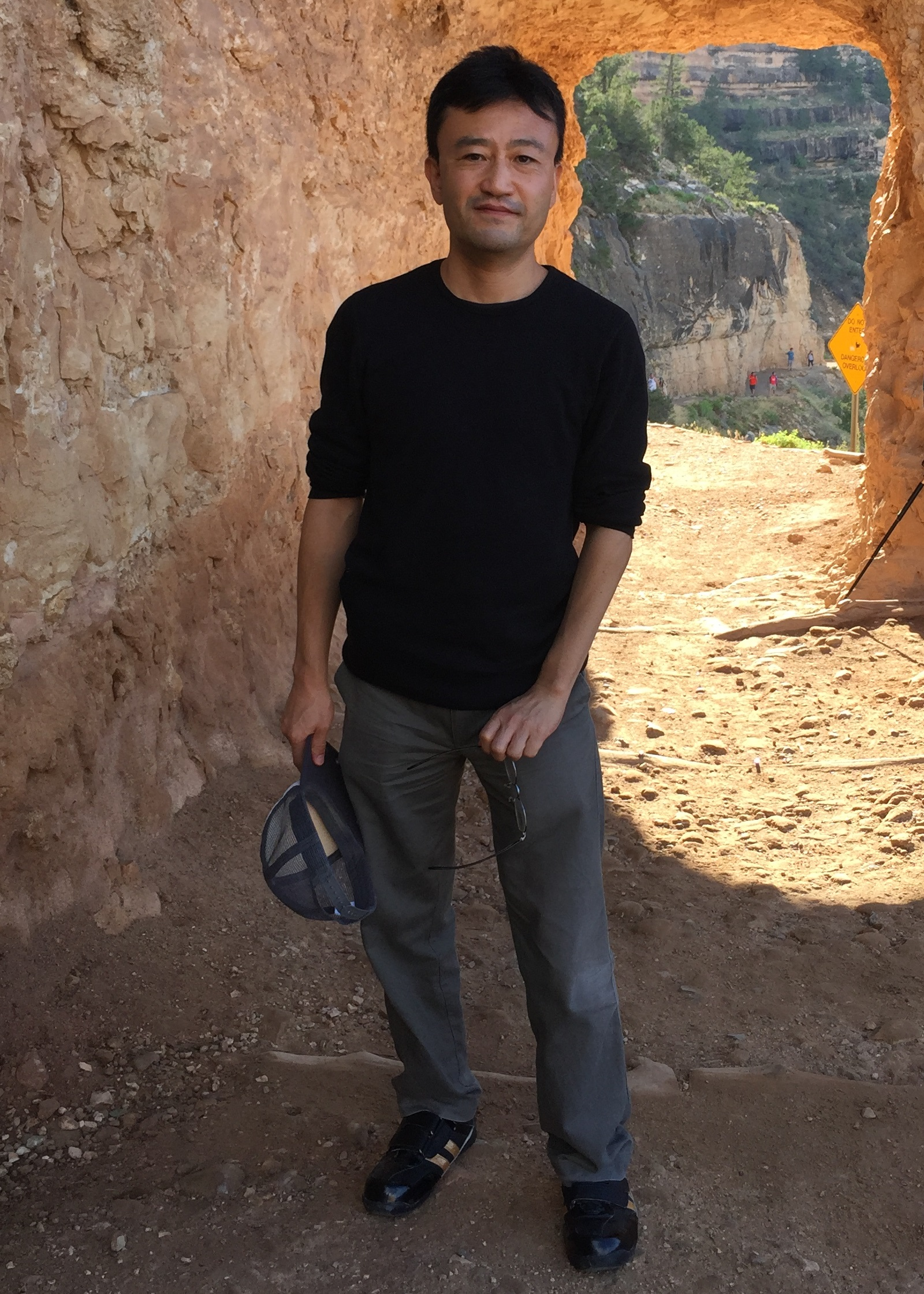 グランドキャニオン